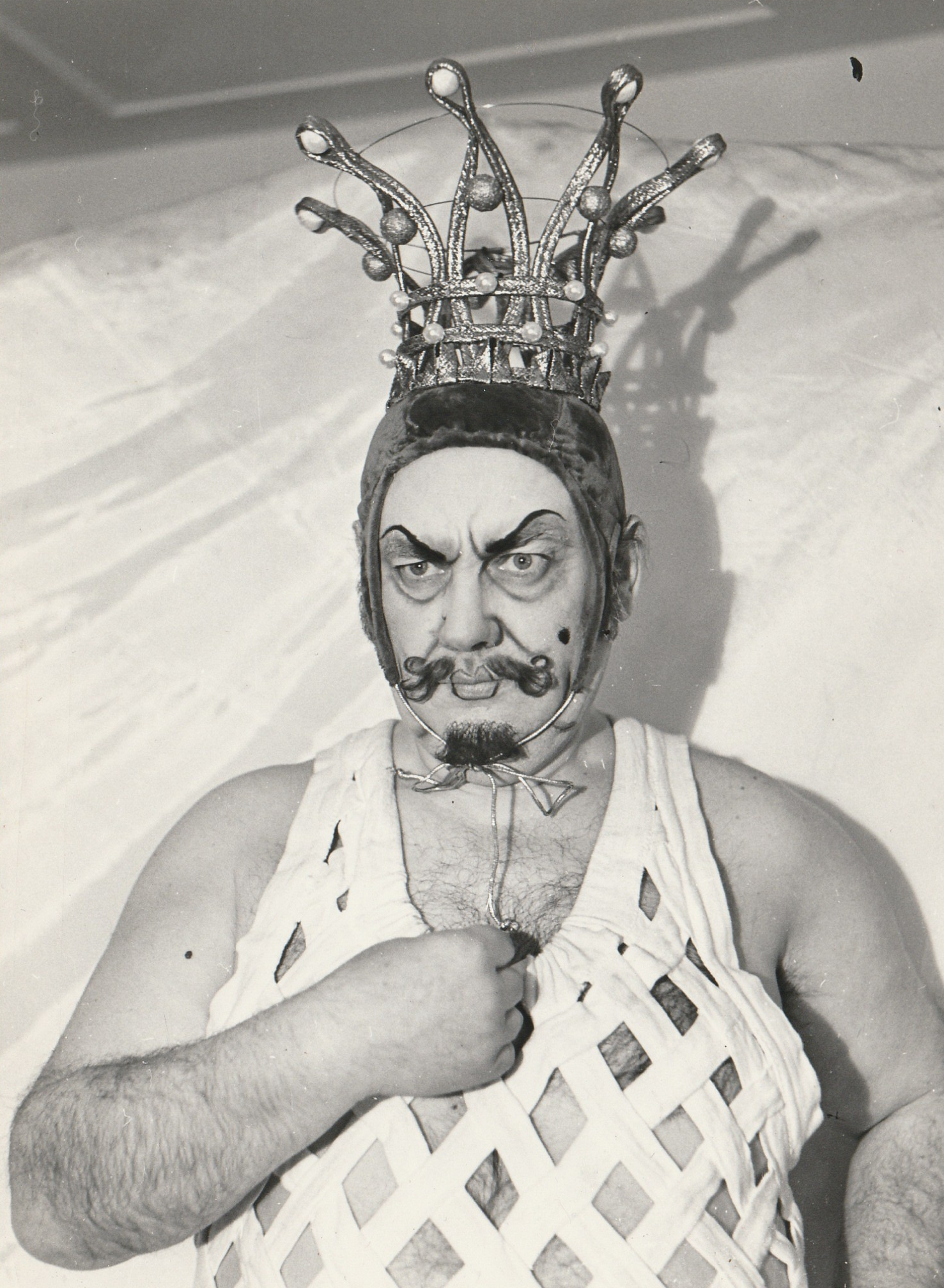 Domahidy László (1920–1996) operaénekes Pomádé király szerepében ( Ránki György: Pomádé király új ruhája)